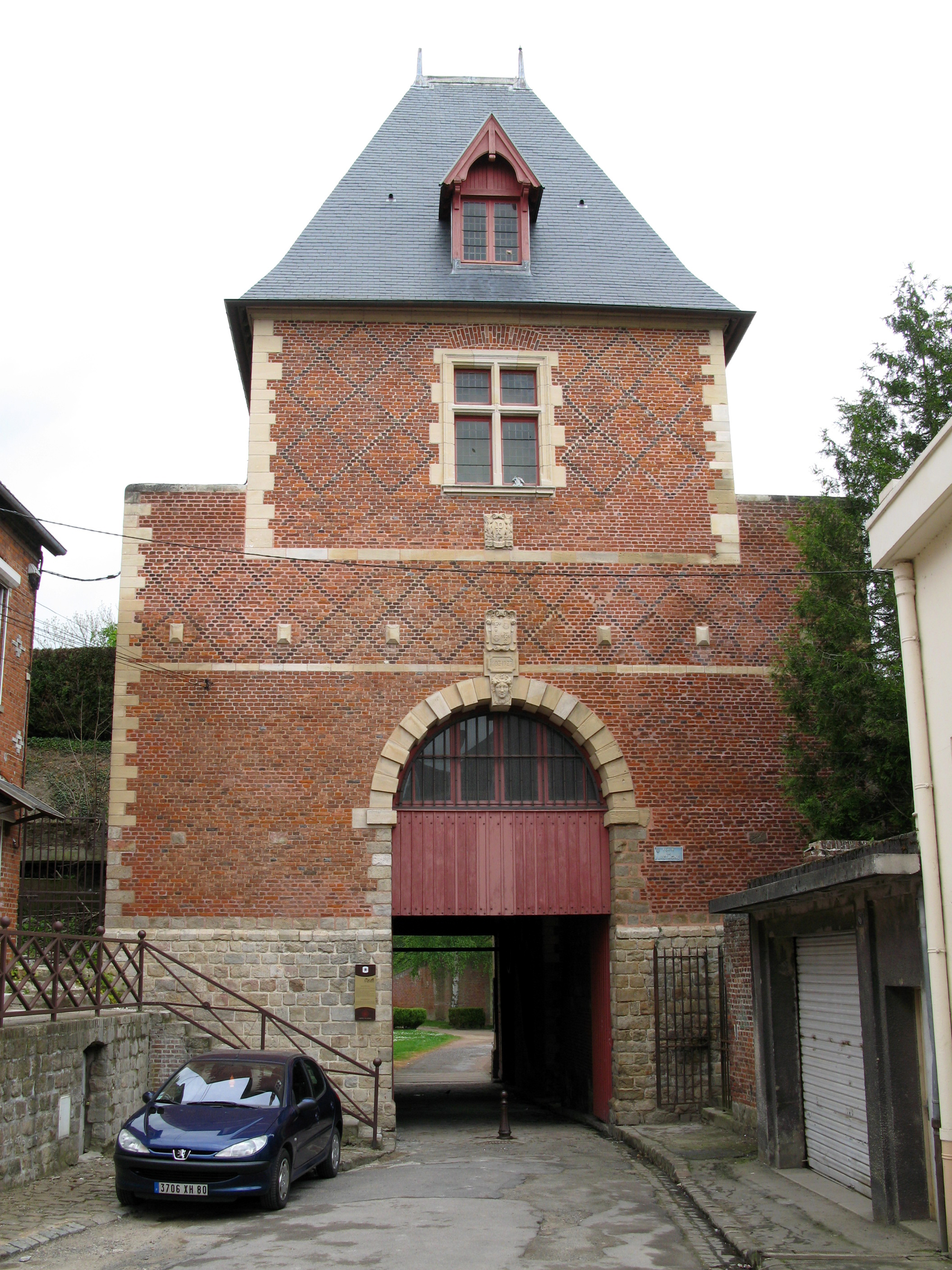 Péronne (Somme, France) - La "Porte de Bretagne" (côté ville ... intérieur des remparts). On remarque les intéressants motifs décoratifs en briques vernissées (ou vitrifées), plus sombres, typiques des constructions de l'époque, en Picardie (en particulier en Thiérache ... cf. les fameuses églises fortifiées) et en Normandie.